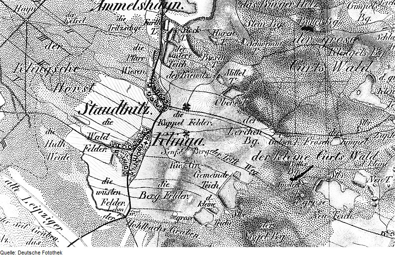 Original image description from the Deutsche Fotothek Parthenstein-Klinga-Staudnitz. Oberreit, Sect. Leipzig, 1836/39